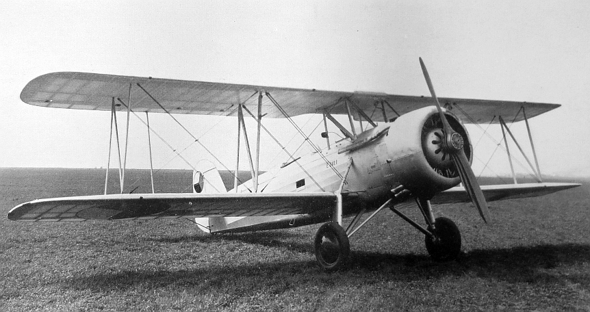 Motor Walter Pollux II a letoun Praga E-241